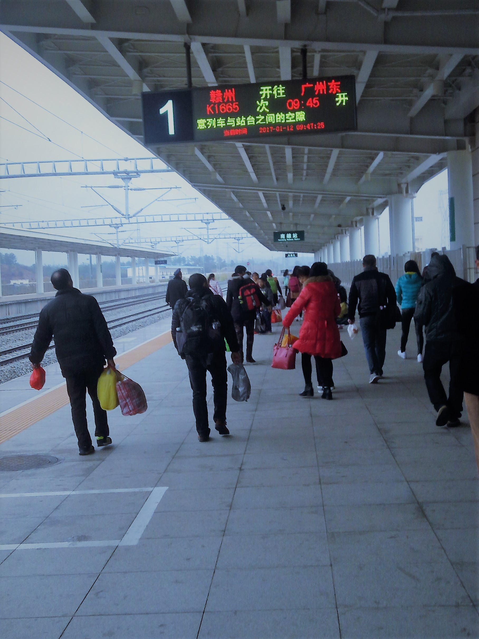 广东南雄火车站